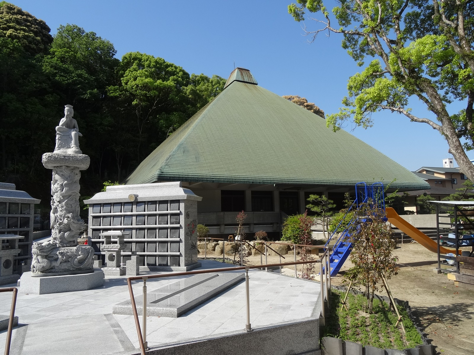 龍海院（岡崎市明大寺町）